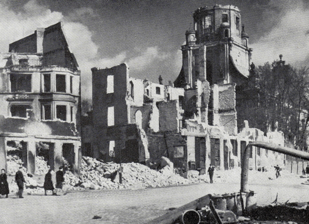 Die Probsteikirche in Königsberg nach dem 2. Luftangriff